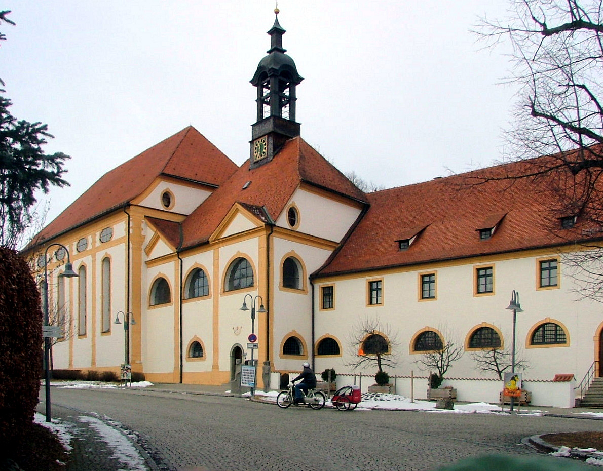 Kloster Heilig Kreuz (Kempten)